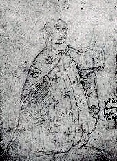 Effigies de Mahaut d'Artois: portail de la Thieuloye